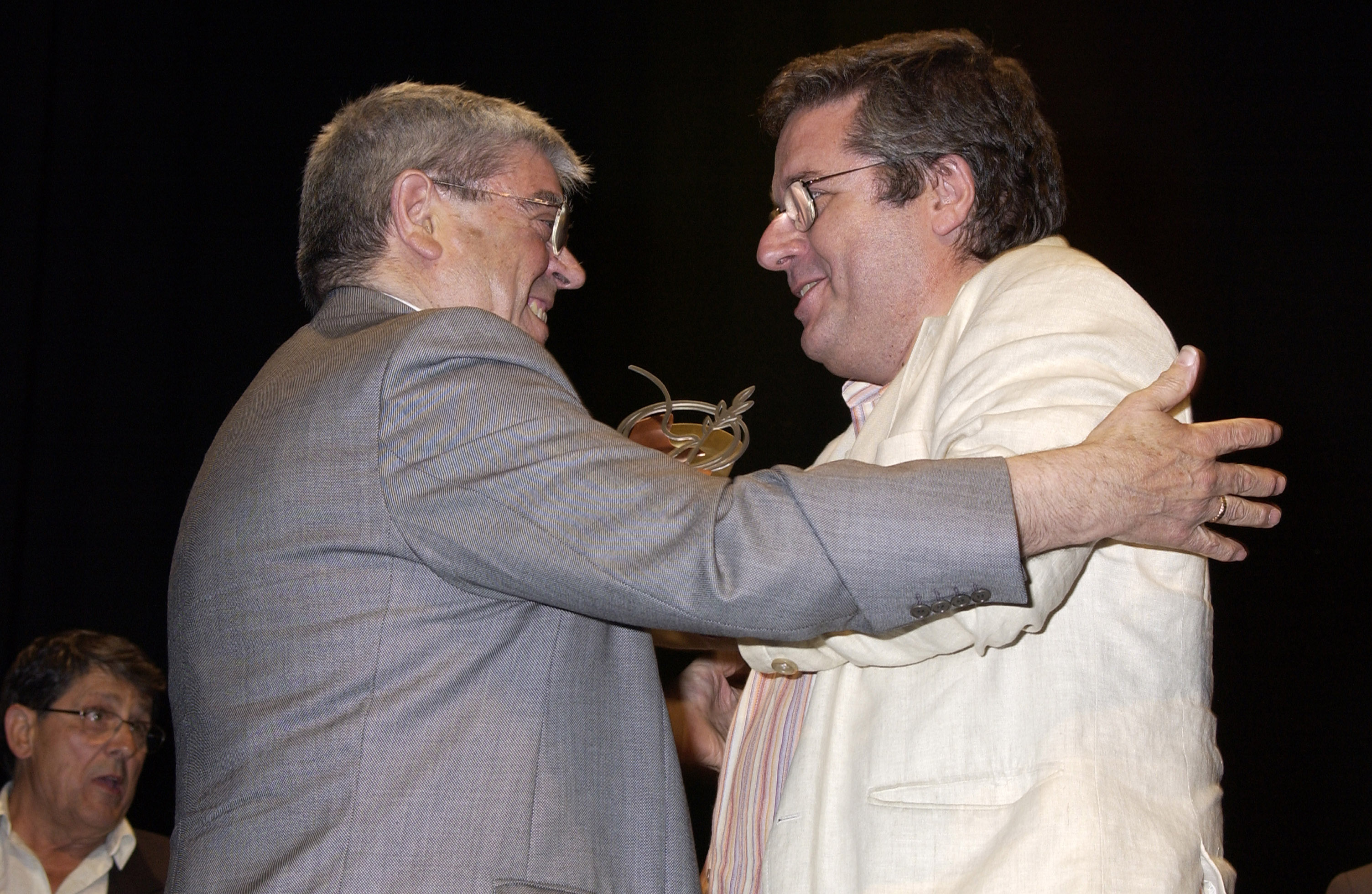 Sardana de l'Any 2006 - Jesús Ventura (dreta) recull el Premi Federació